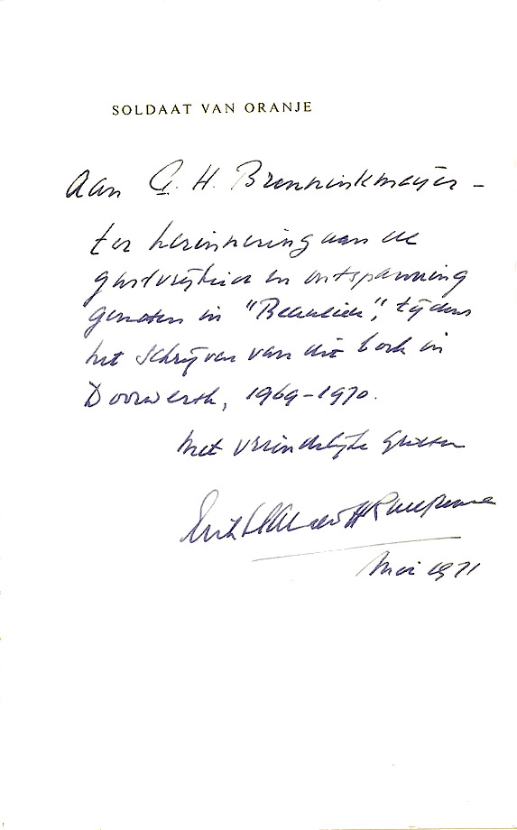 gesigneerd binnenblad van het boek soldaat van oranje 1940-1945'